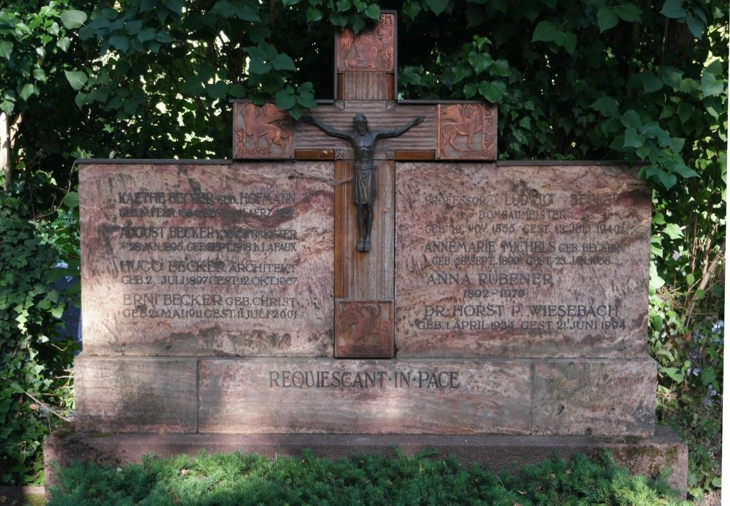 Grab des Kirchenarchitekten Ludwig Becker, 1855-1940, auf dem Hauptfriedhof Mainz